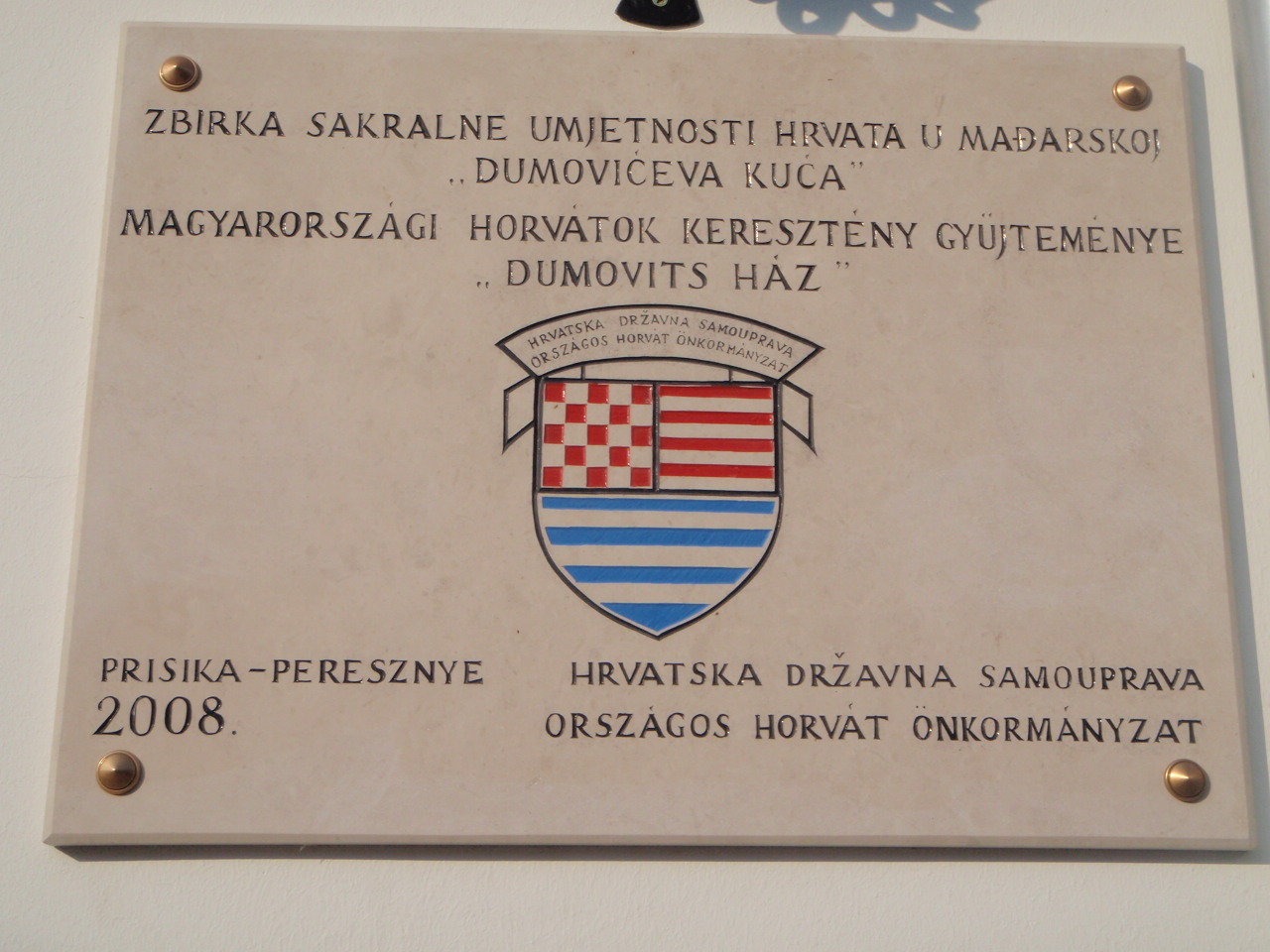 Dumovits-Haus, Muzeum in Peresznye, mit Denkmal